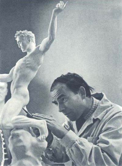 Copyright Museum Arno Breker/MARCO-VG, Bonn Toestemming publicatie.